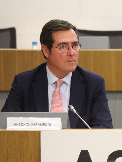 El alcalde de Madrid, José Luis Martínez-Almeida, ha participado hoy, junto a la ministra de Industria, Comercio y Turismo en funciones, Reyes Maroto, en el acto de clausura de la Asamblea General de la Confederación Empresarial de Madrid (CEIM), en el que el empresario y actual secretario general, Miguel Garrido de la Cierva, ha sido elegido como nuevo presidente de la patronal madrileña. Durante su intervención Martínez-Almeida ha querido dejar claro que considera fundamental tener un tejido empresarial fuerte en Madrid, que cree empleo, genere nuevas inversiones y que lidere la innovación en España.